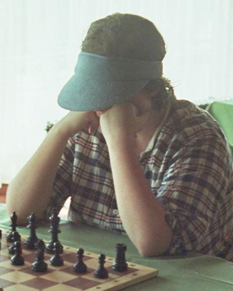 Rachel Crotto 1982 in Bad Kissingen